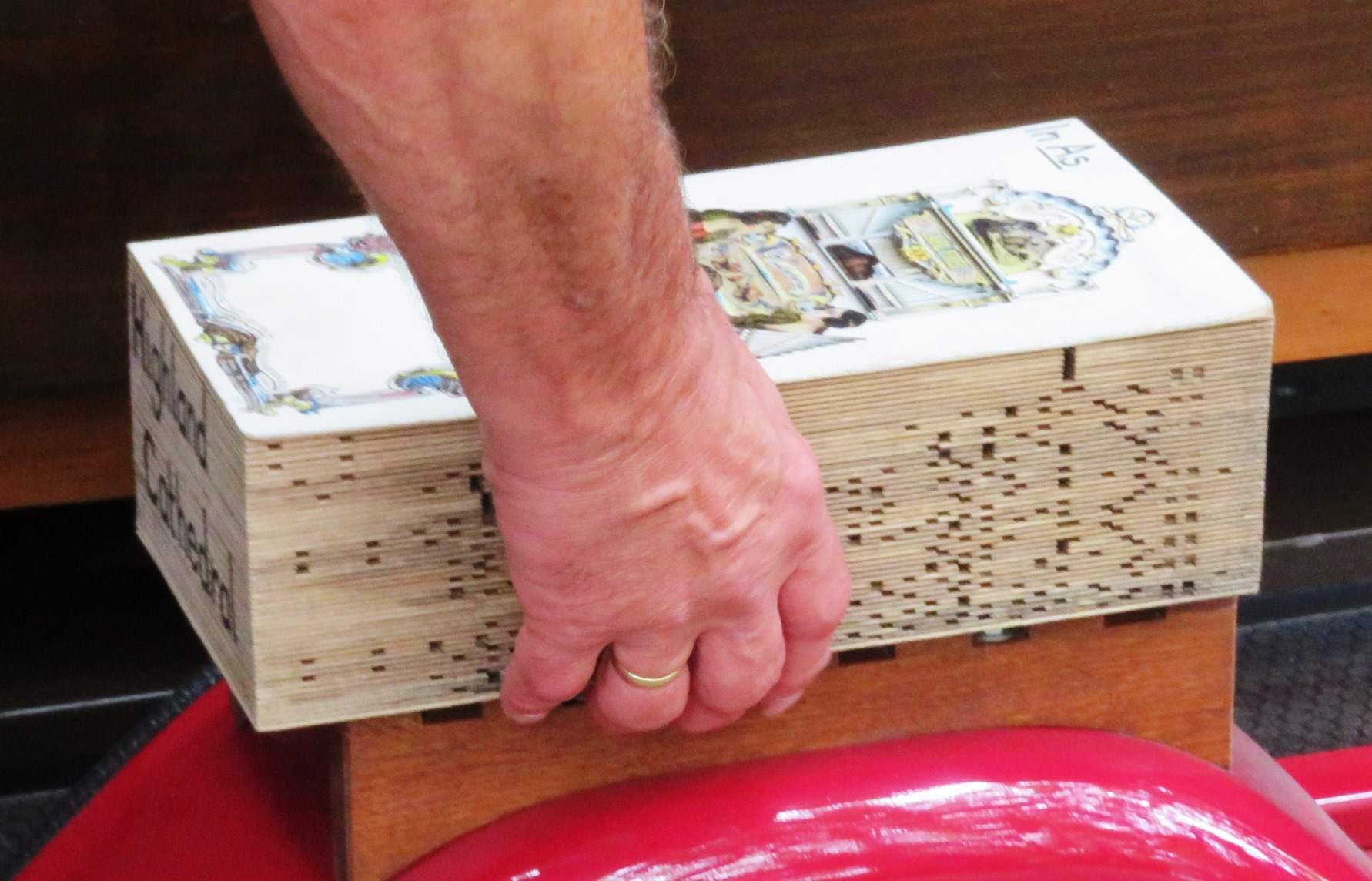 Orgelfest Waldkirch 2017